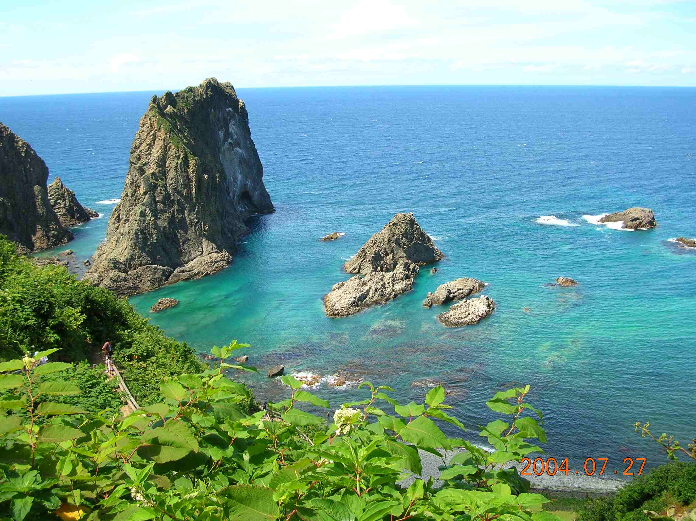 島武意海岸（Shimamui beach, Shyakotan）